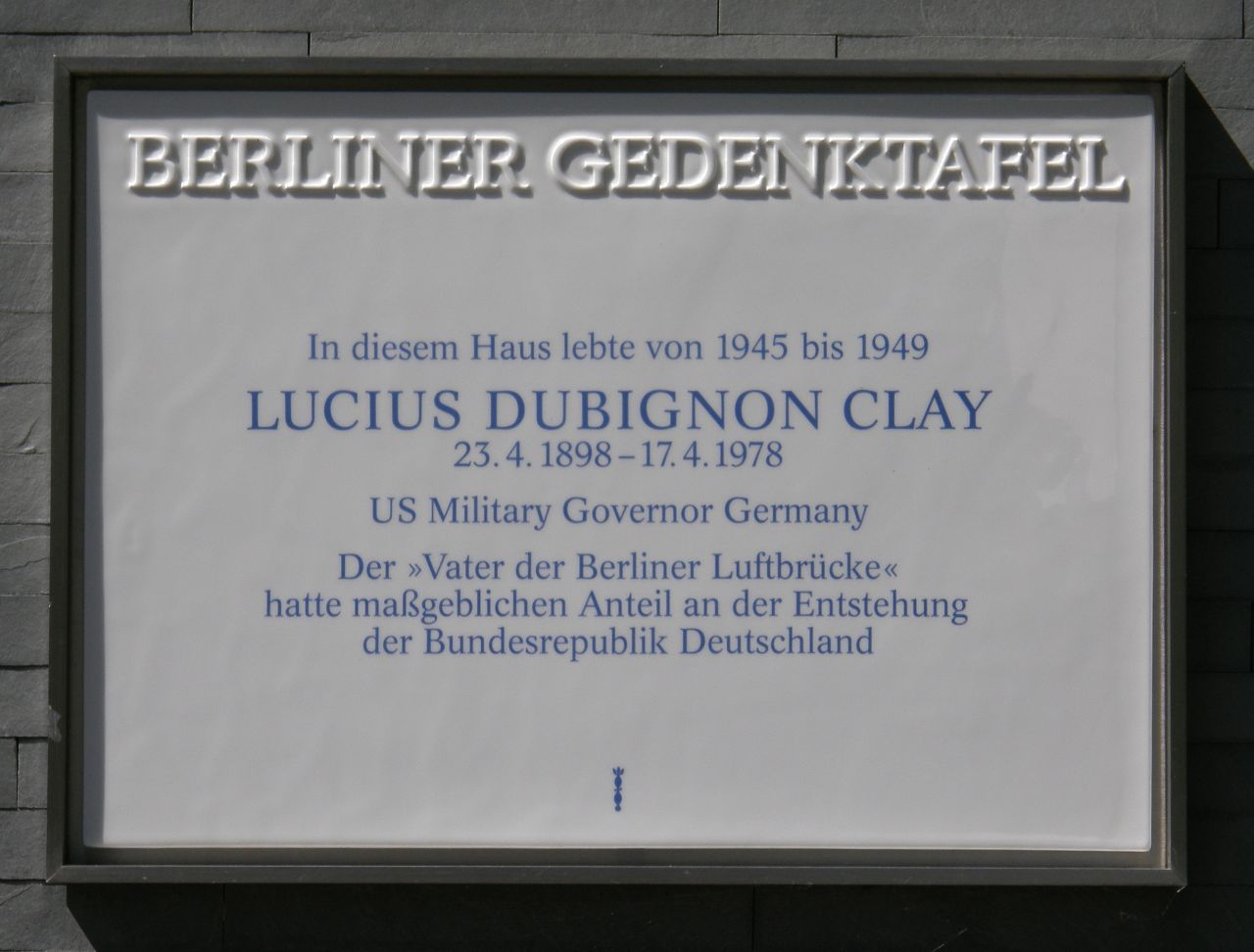 Berliner Gedenktafel für Lucius D. Clay. Im Dol 46-48, Berlin-Dahlem, enthüllt am 23. April 2006